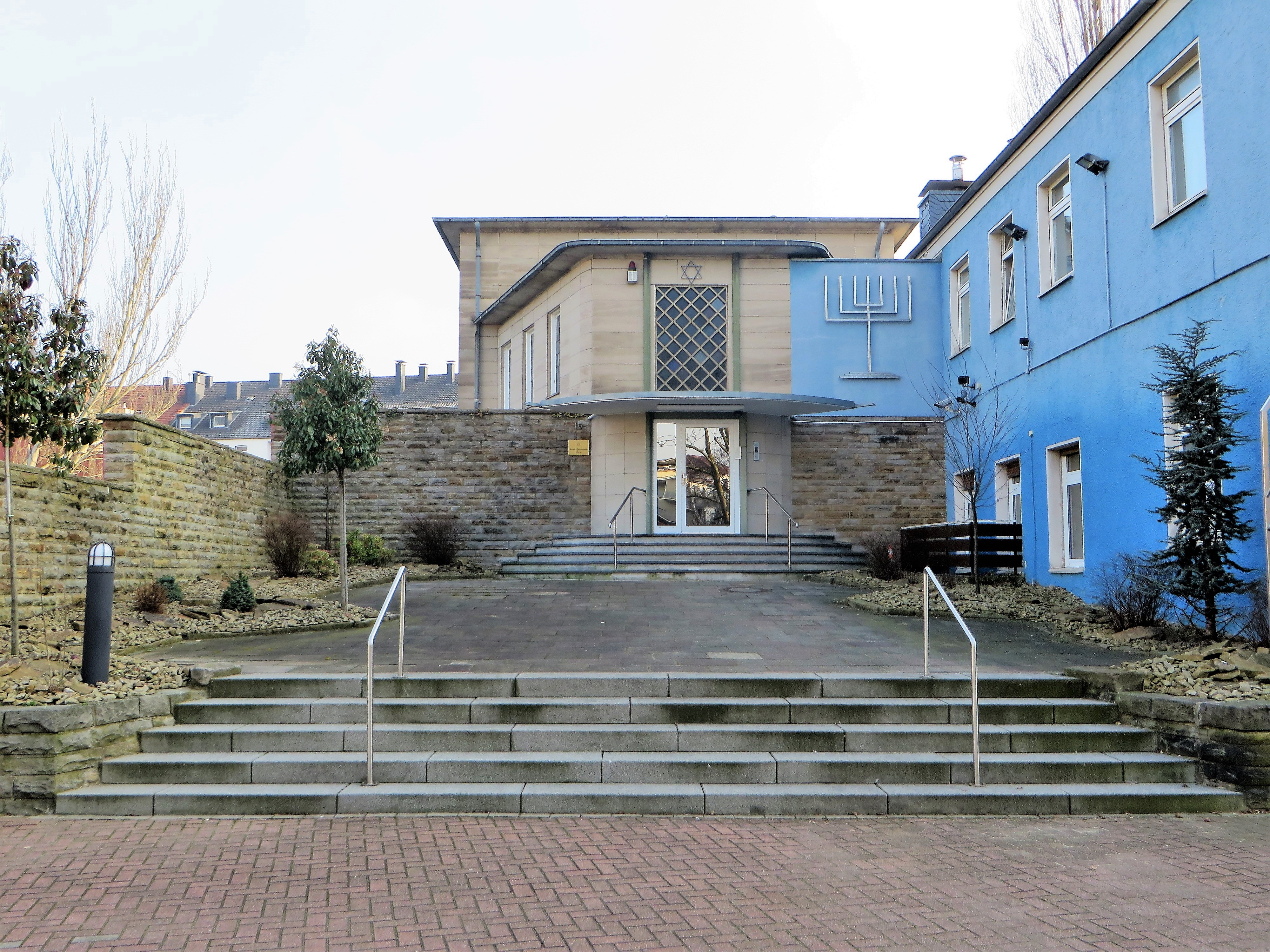 Synagoge der Jüdischen Gemeinde Hagen in der Potthofstraße. Eingeweiht am 18. September 1960. Die an gleicher Stelle stehende ehemalige alte Synagoge von 1859 wurde in der Nacht vom 9. November 1938 von den Nationalsozialisten in Brand gesetzt und zerstört.